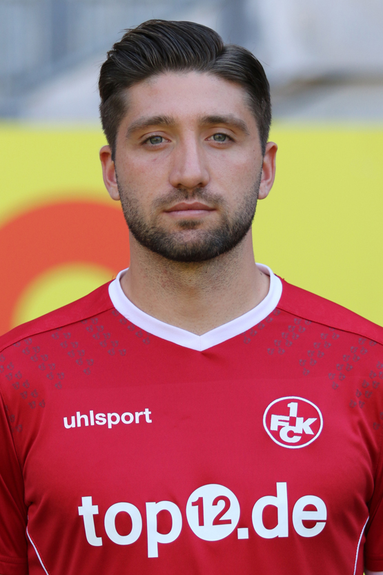 Brandon Borrello